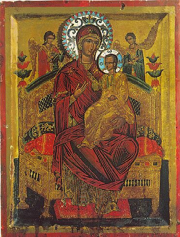 Всецарица